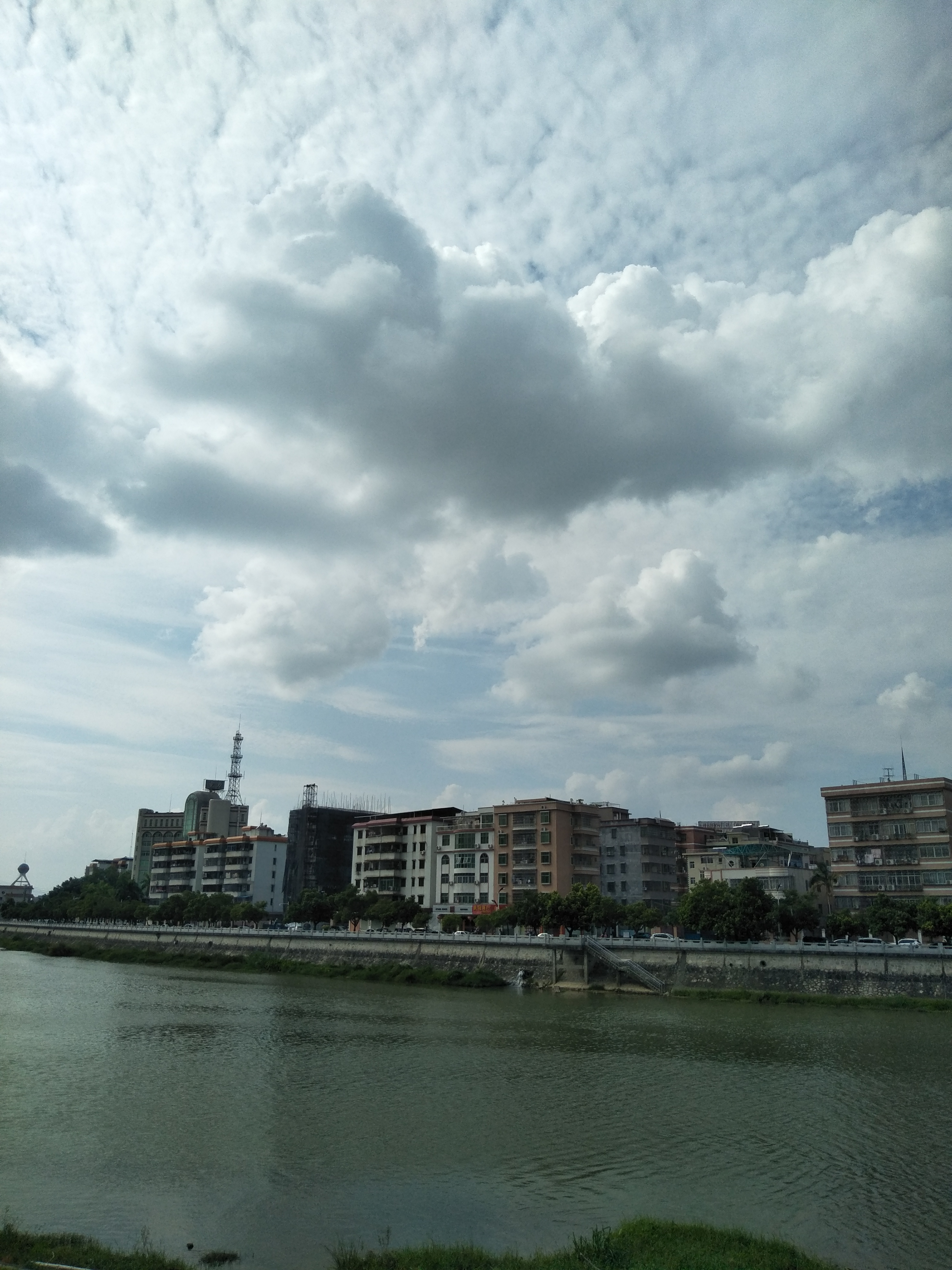 龙门县城“一河两岸”日间风景